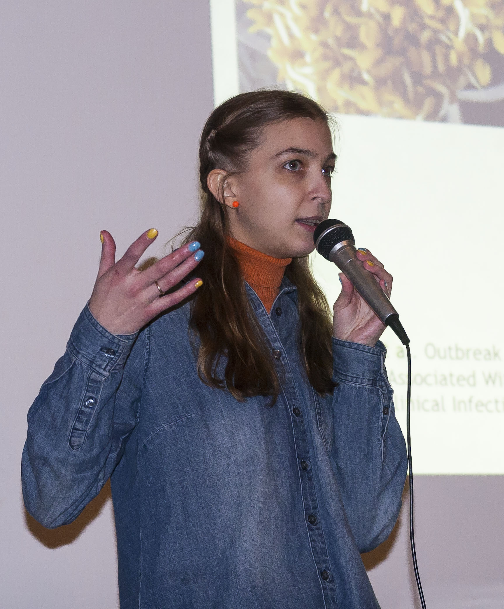 Ася Казанцева під час лекції в Києві (2016)